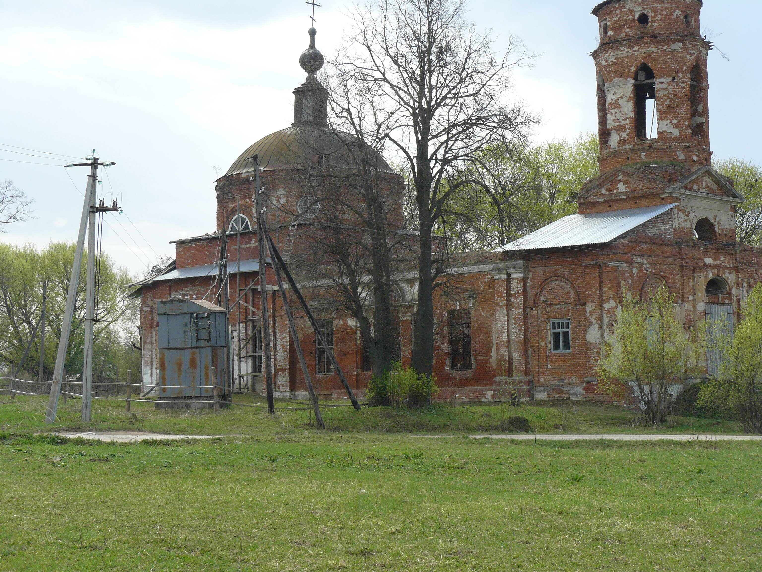 Алексин. Церковь в Спас-Конино. 06/05/2009г.